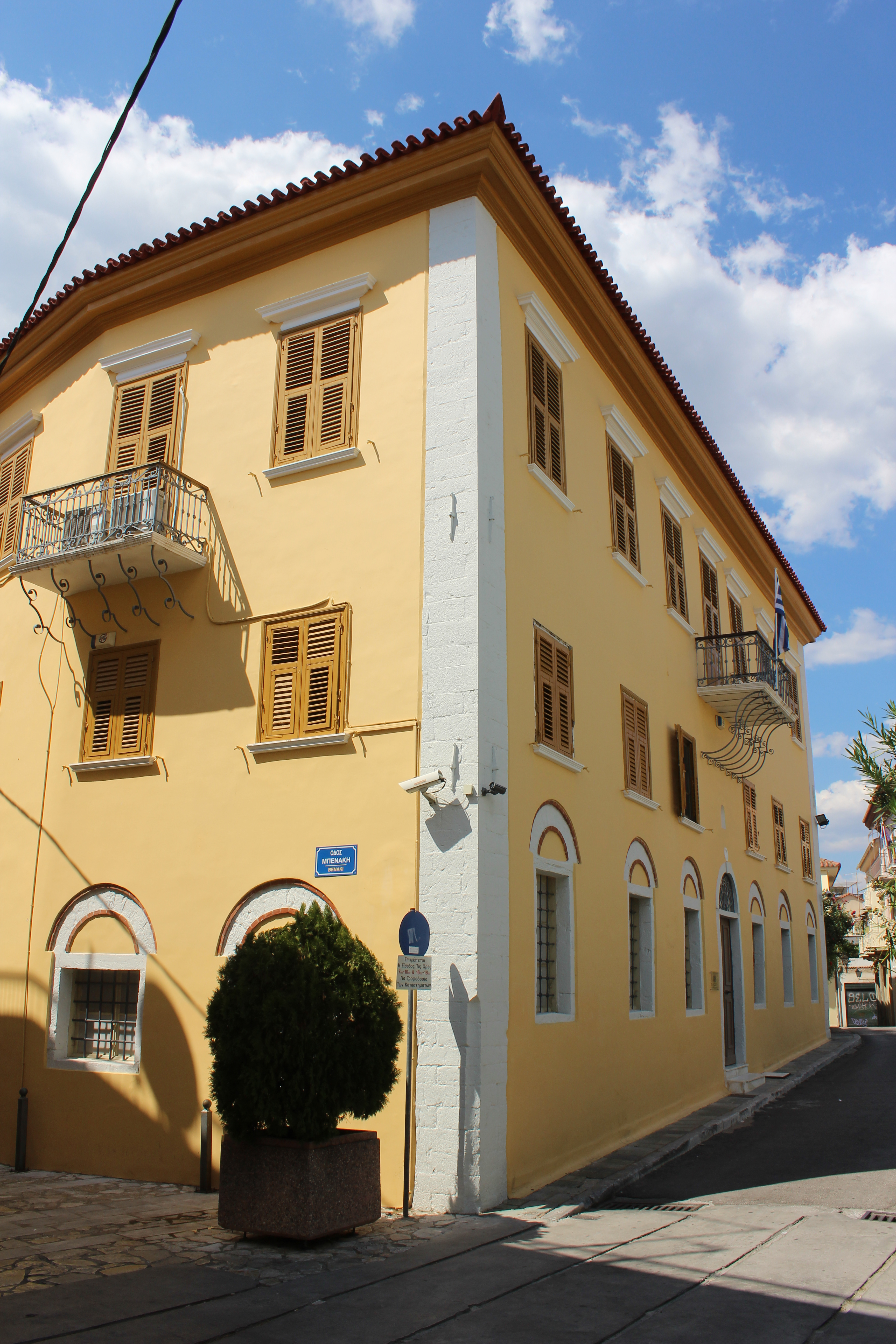 Μπενάκειο Αρχαιολογικό Μουσείο Καλαμάτας«Μπενάκειο Αρχαιολογικό Μουσείο Καλαμάτας»